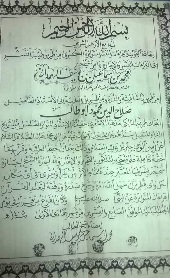 إجازة الشيخ محمد إسماعيل الهمداني (شيخ مقرأة الجامع الأزهر) للشيخ صلاح الدين التجاني